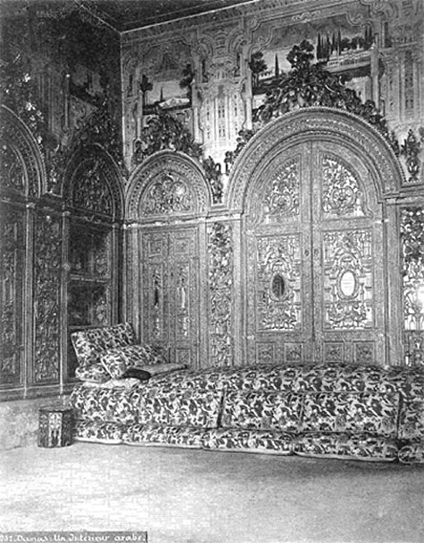 صالون في بيت نظام شارلير 1870